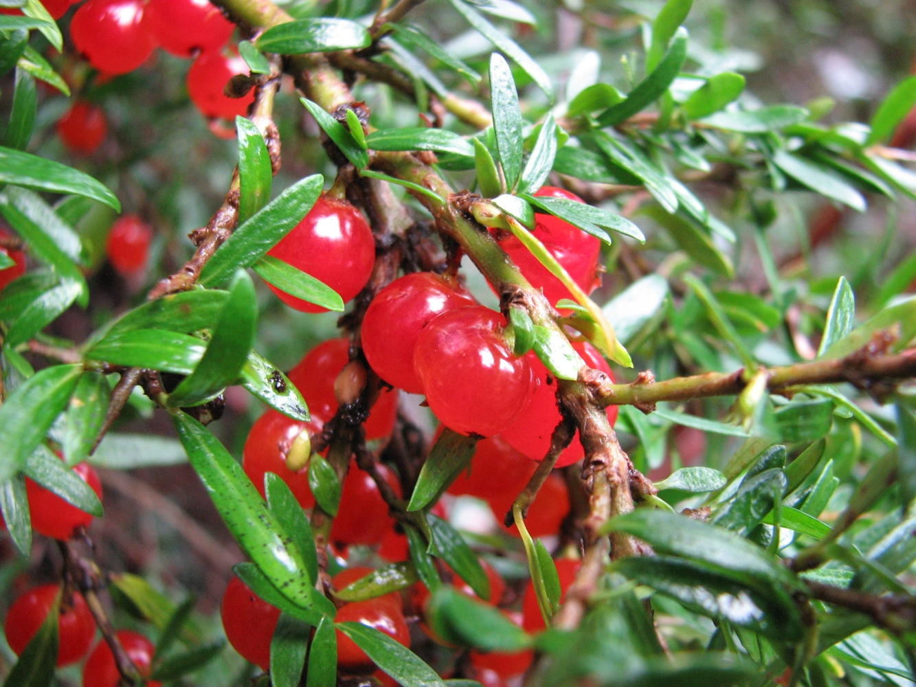 Coprosma nidida, Mount Donna Buang, Victoria, Australia